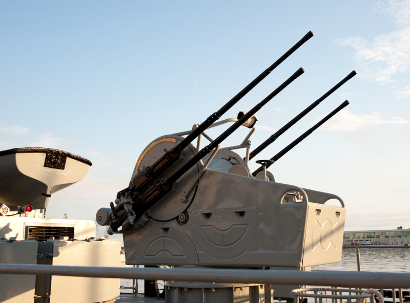 Dan HRM-a, Rijeka